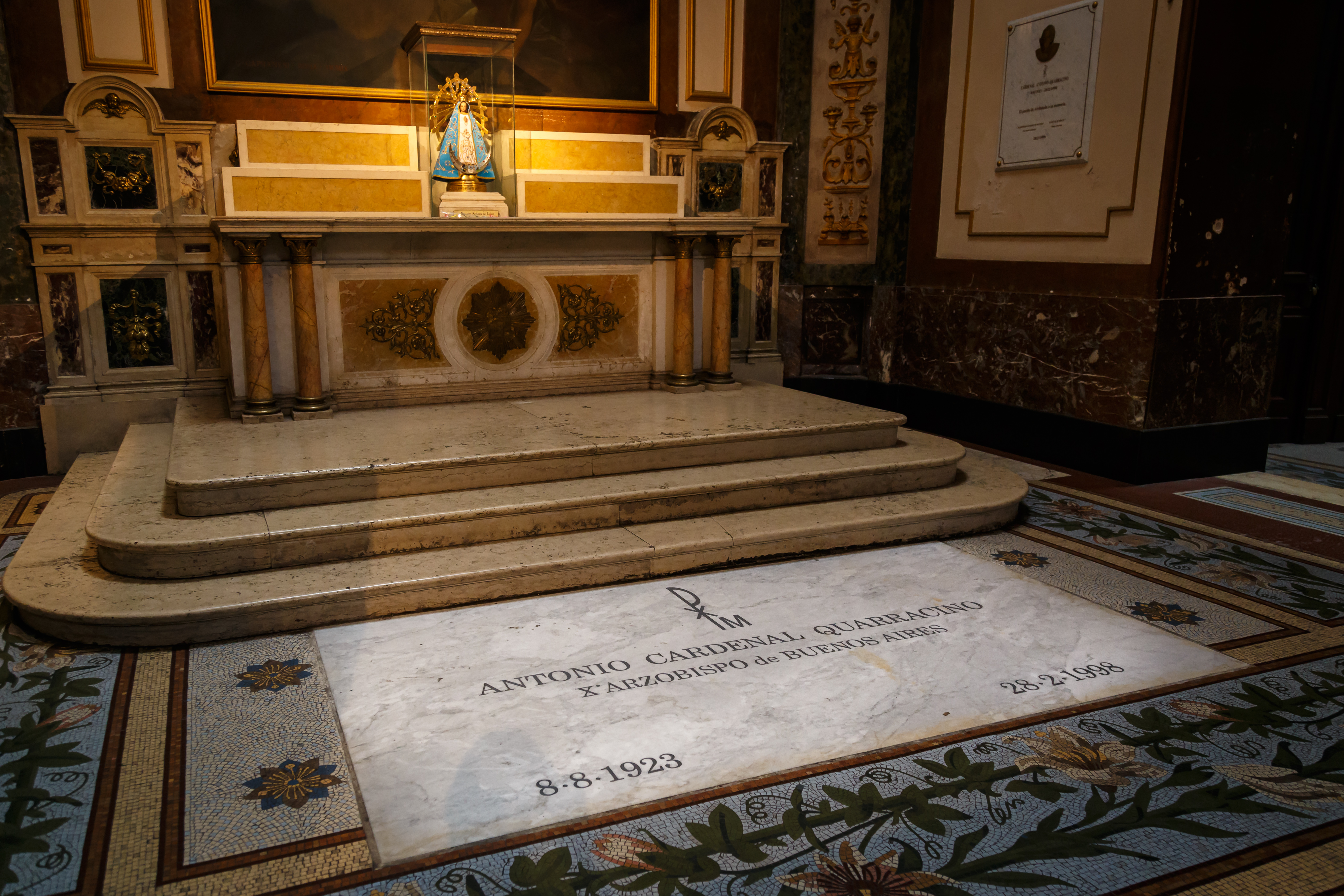 Interior de la Catedral Metropolitana de Buenos Aires. Capilla de Nuestra Señora del Carmen. La pequeña imagen exhibida corresponde a Nuestra Señora de Luján. Al pie se encuentra la tumba del Cardenal Antonio Quarracino.